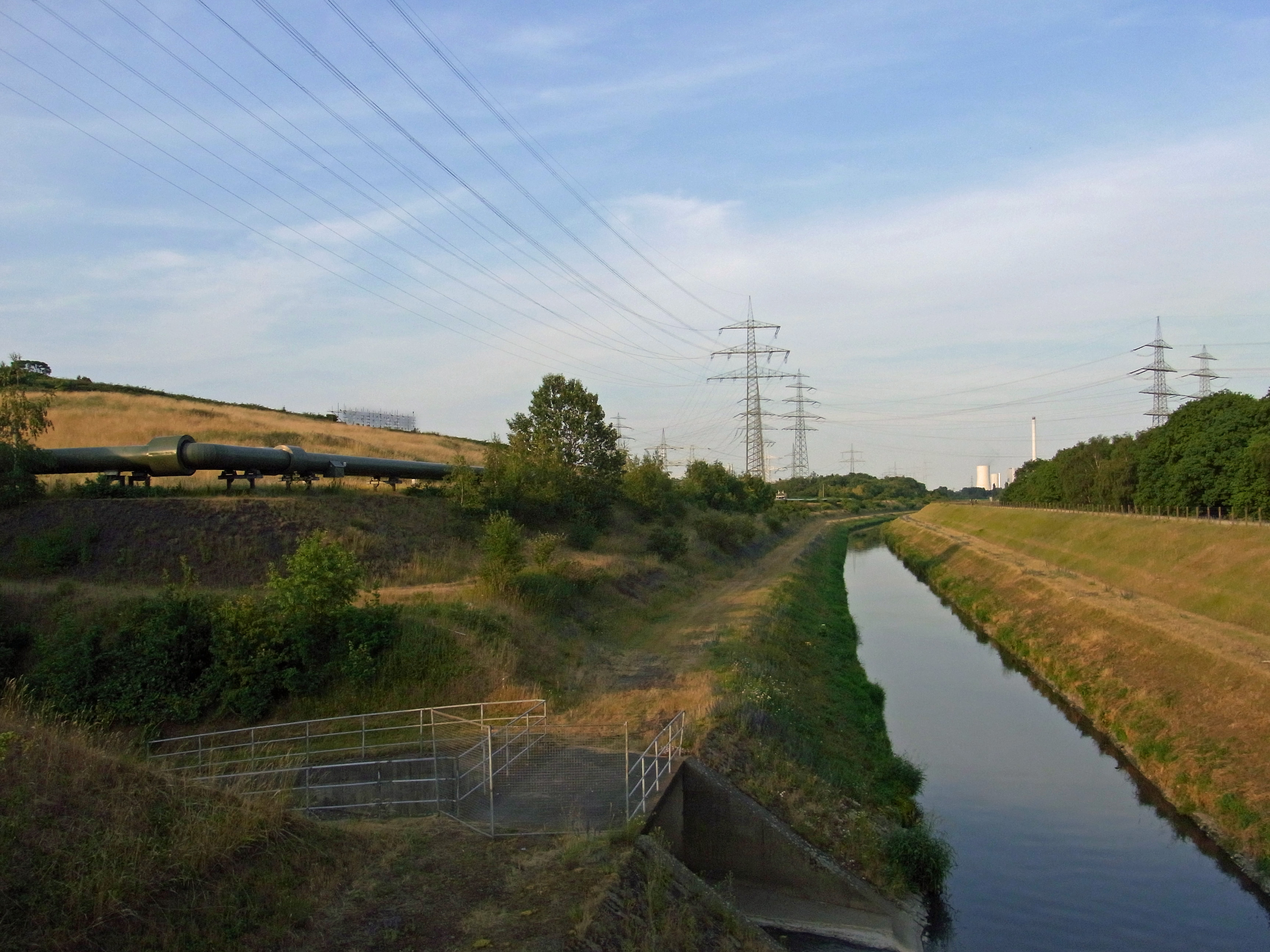 Emscherkunst.2010 Monica Bonvicini: Satisfy Me